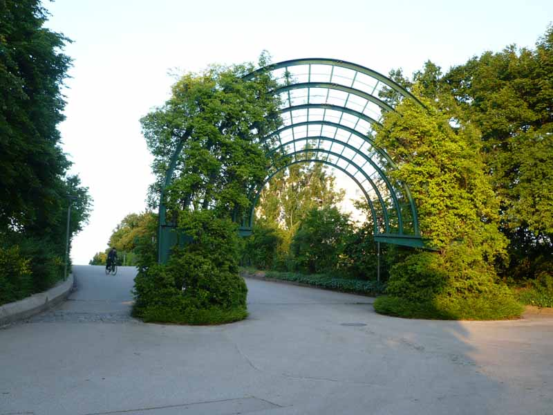 Fußgängerüberführung über die Garmischer Straße in München. Verbindung des östlichen und westlichen Teil des Westparks.